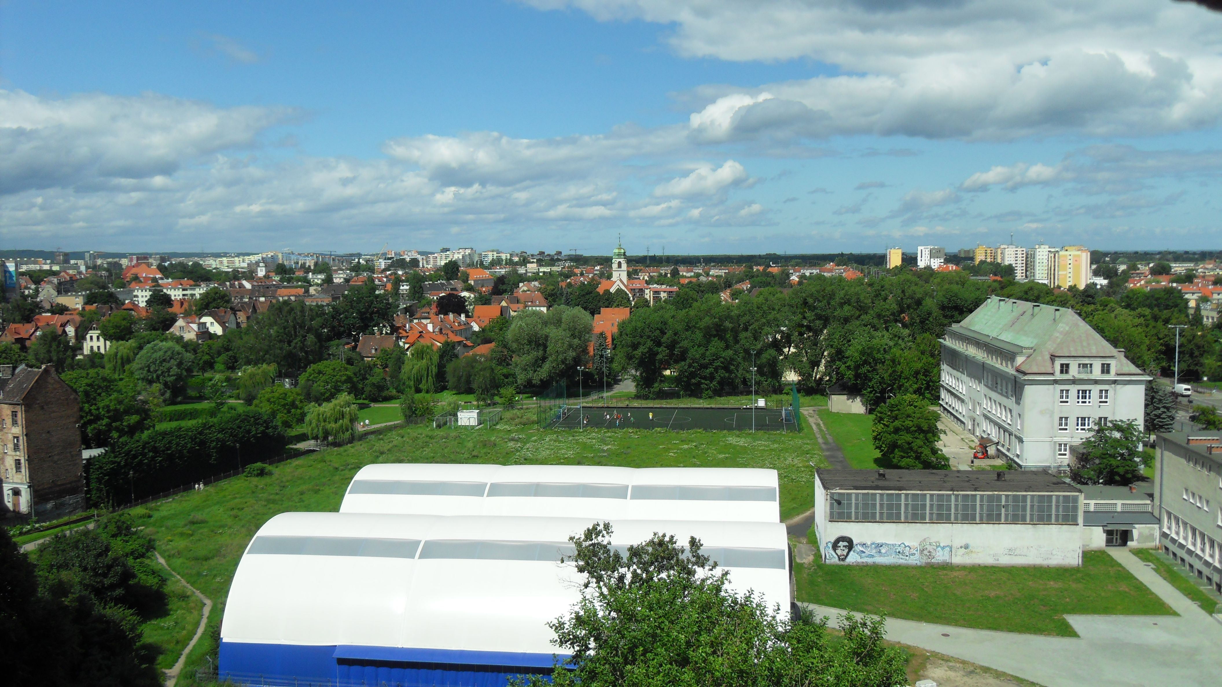 Gdańsk, Wrzeszcz Dolny z wysokości 30 m (dużo ładniejszy).